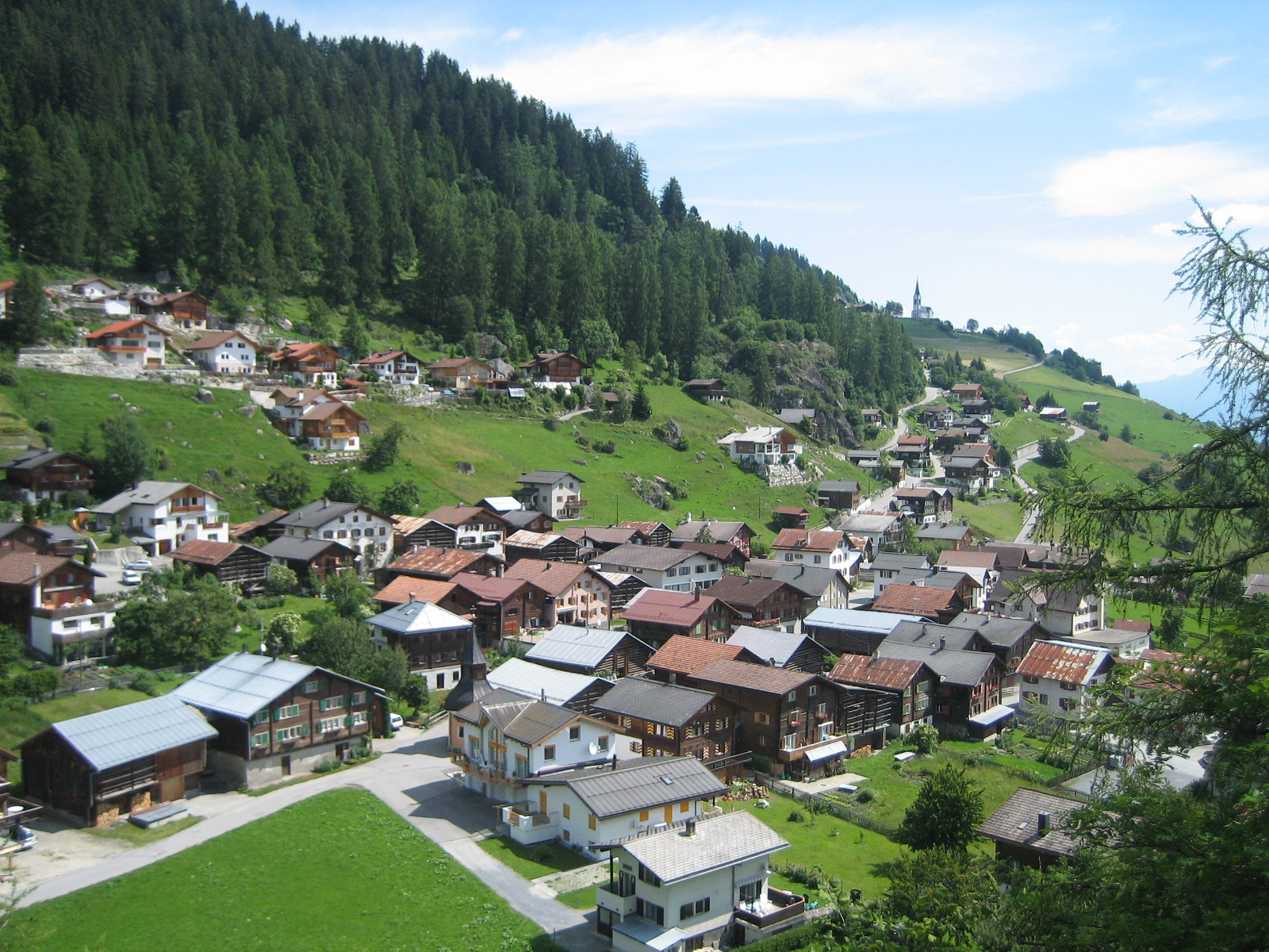 Ruschein